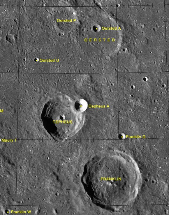 Cráter Cepheus LROC (Localización)